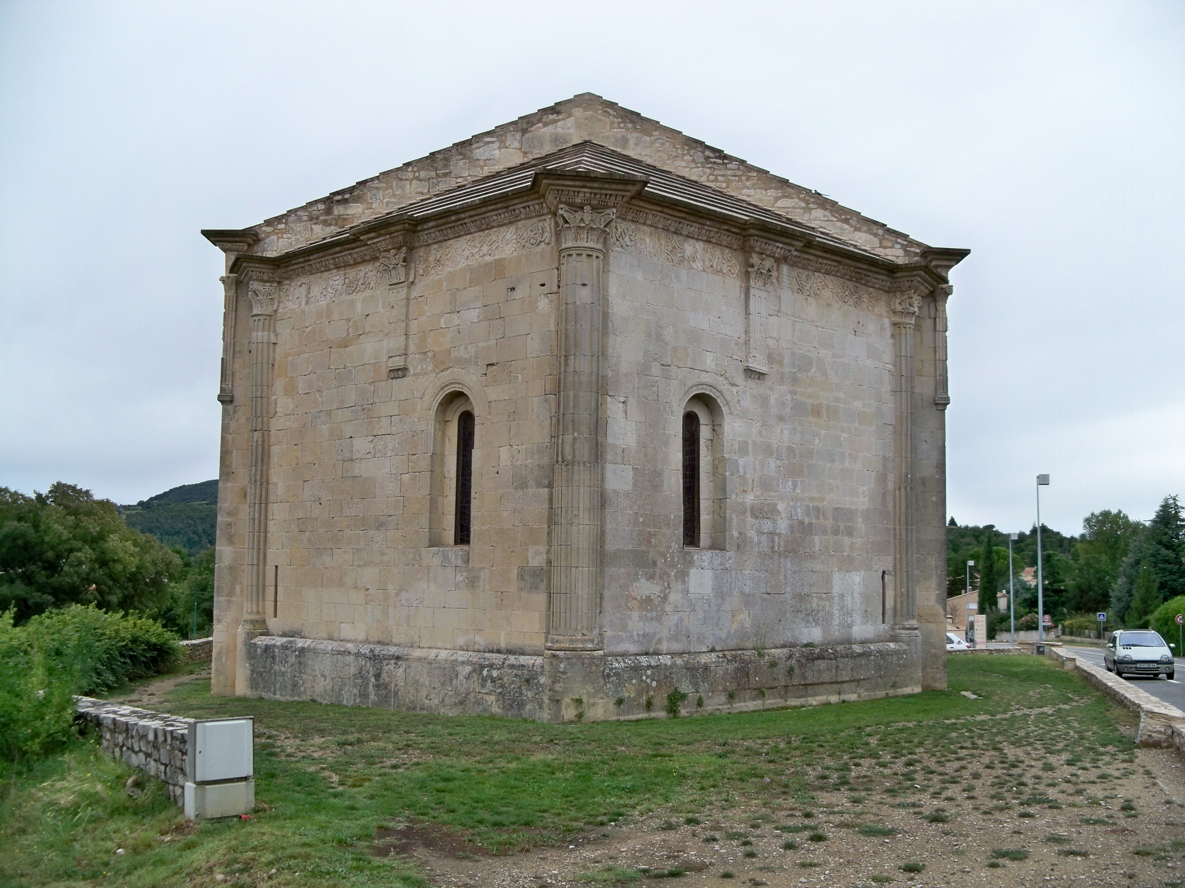 Chapelle Saint-Quenin à Vaison la Romaine (84)